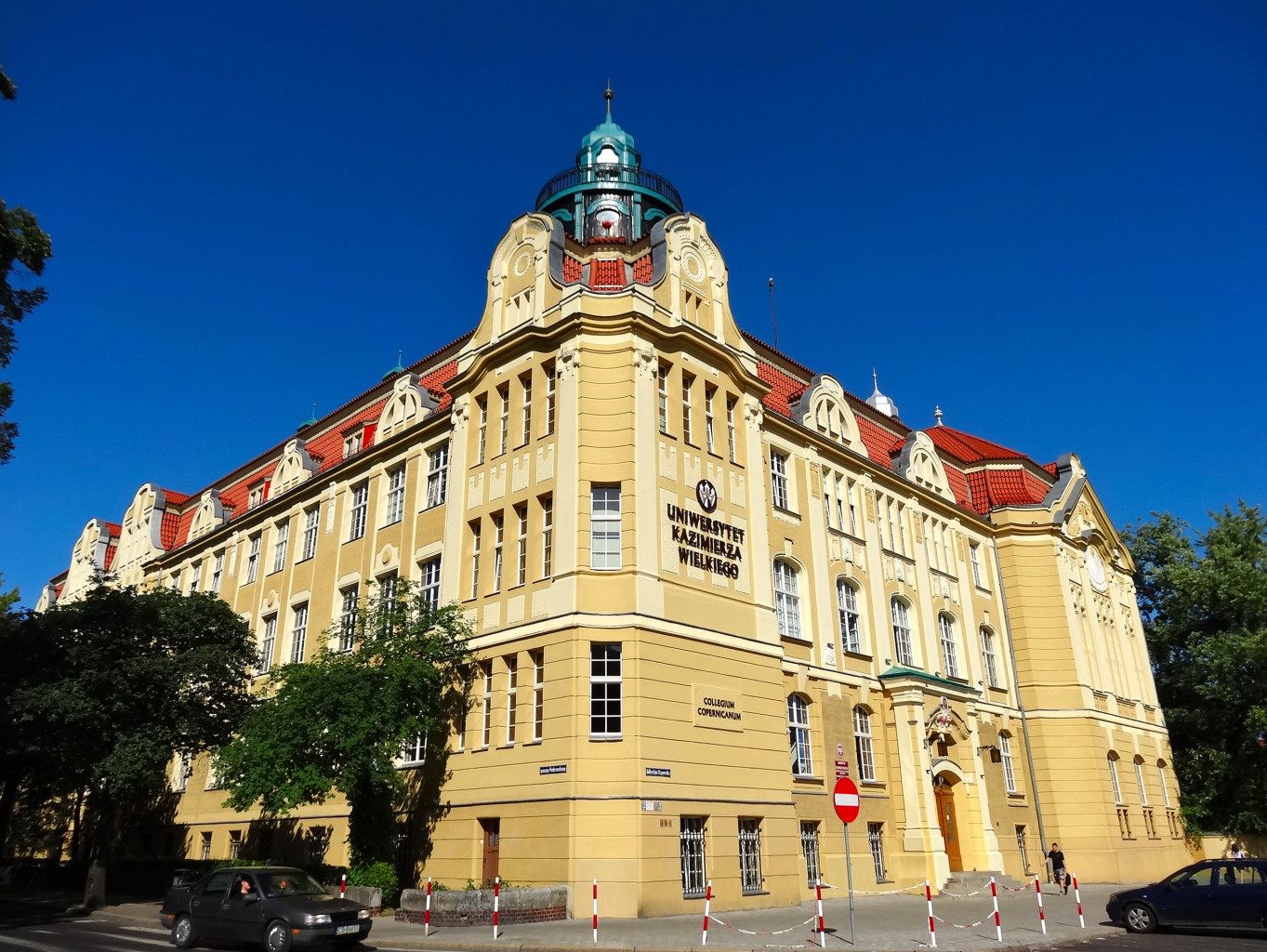 Budynek ul. Kopernika 1 w Bydgoszczy - dawna Miejska Szkoła Realna 1905-1907, ob. Collegium Copernicanum Uniwersytetu Kazimierza Wielkiego w Bydgoszczy